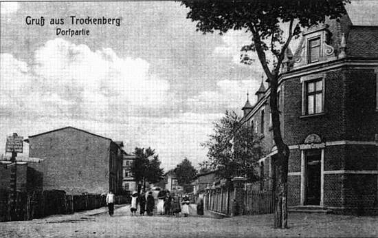 Przedwojenna ul. 9 maja